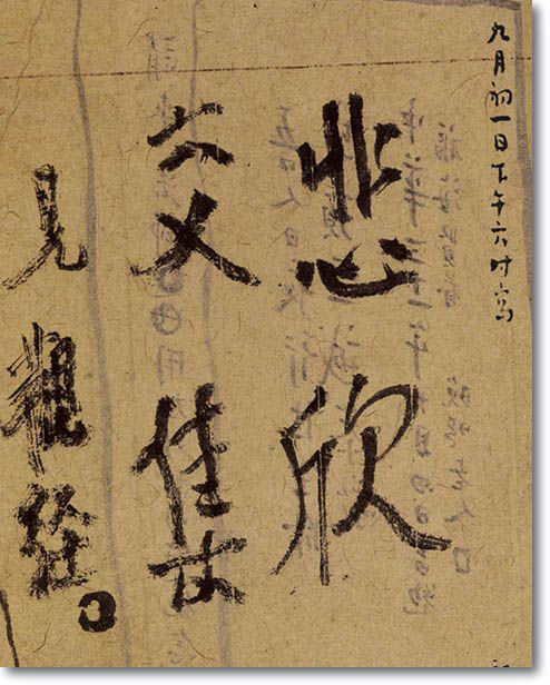 李叔同绝笔